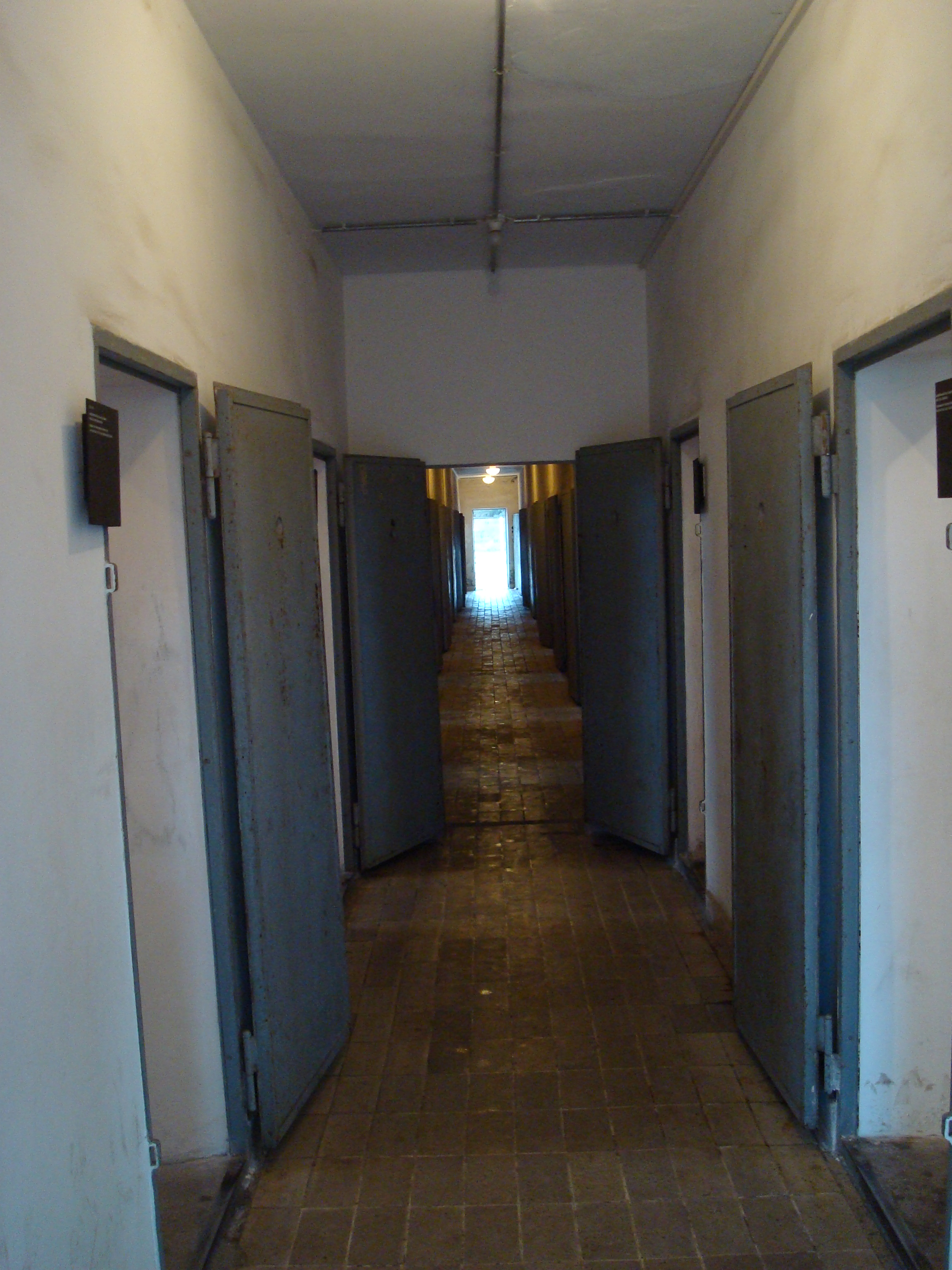 Celdas de castigo en Sachsenhausen